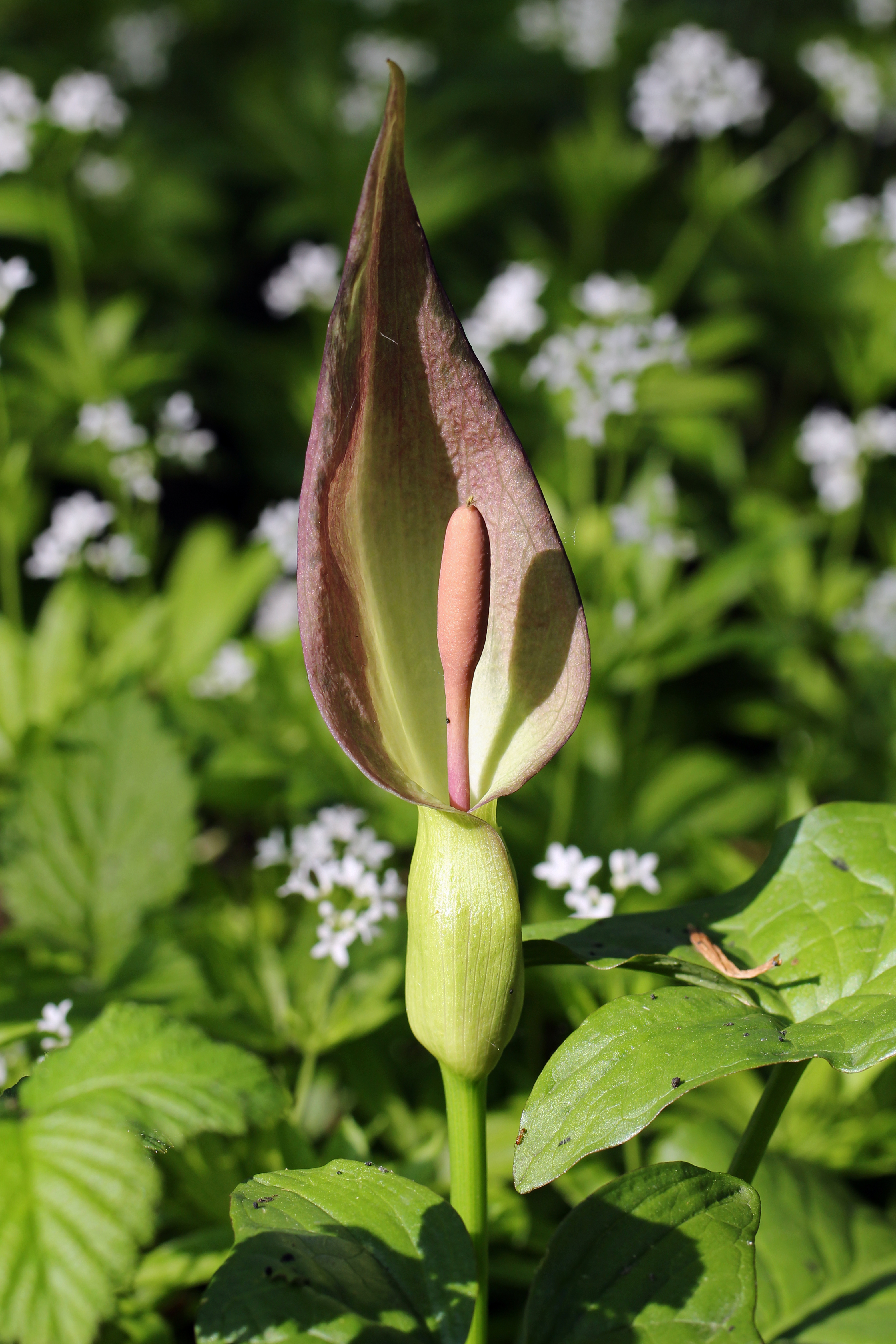 Aronstab im Naturschutzgebiet Sattel-Baunzen This media shows the nature reserve in Lower Austria with the ID 58.